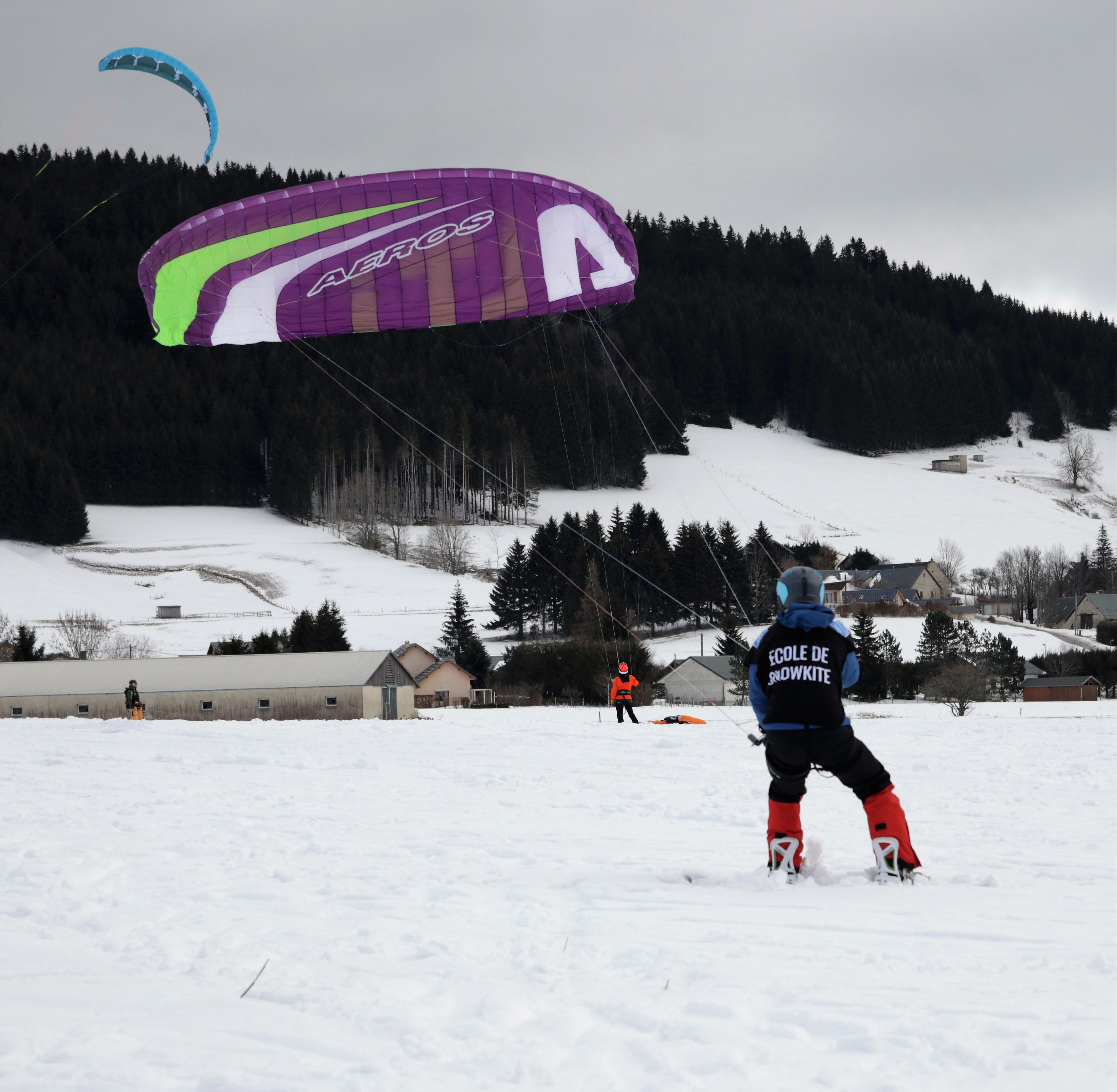 Snowkiting à Autrans les jours de la Foulée Blanche. Autrans-Méaudre-en-Vercors, Isère, France.